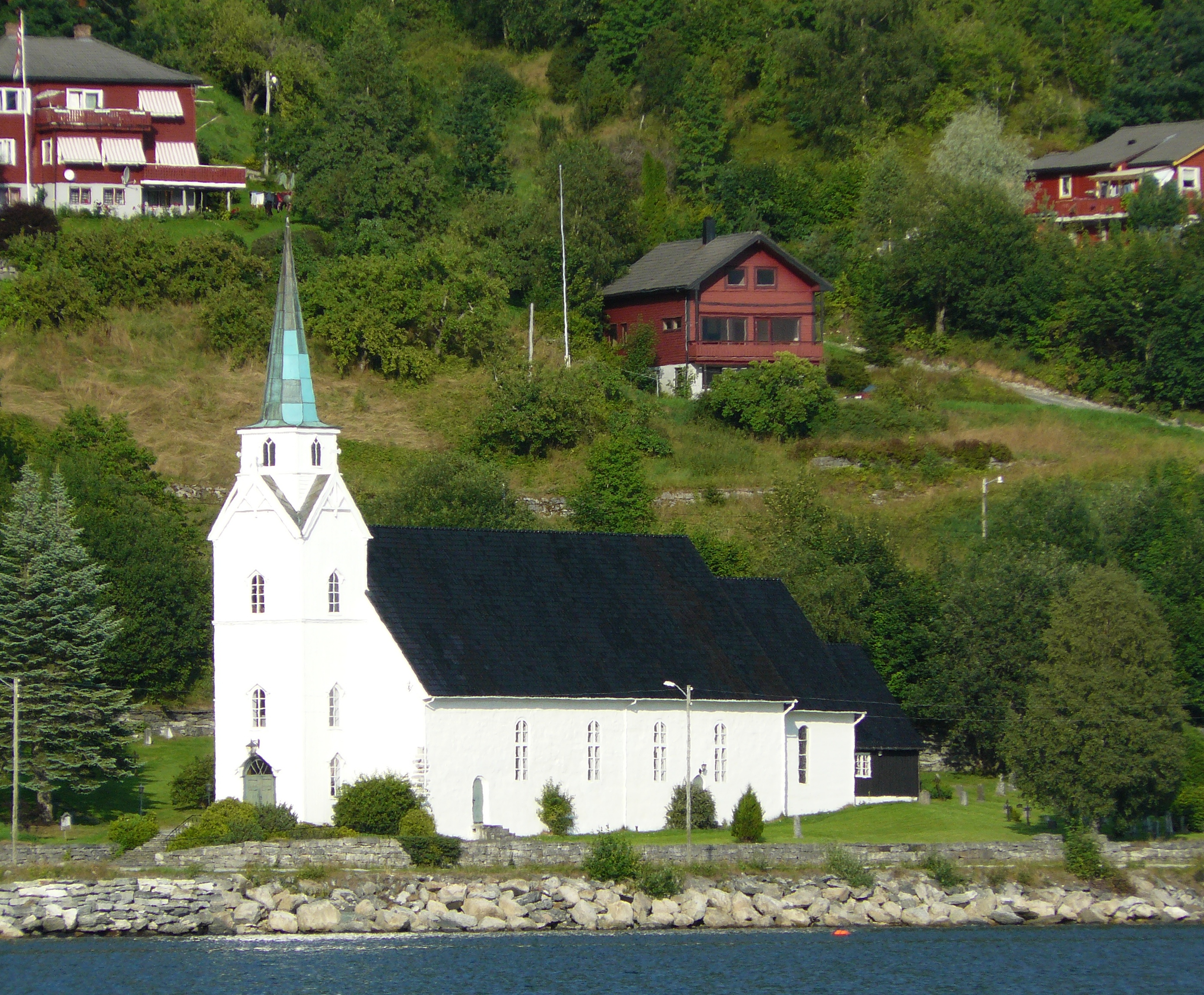 Vereide church in Gloppen, Norway - 1